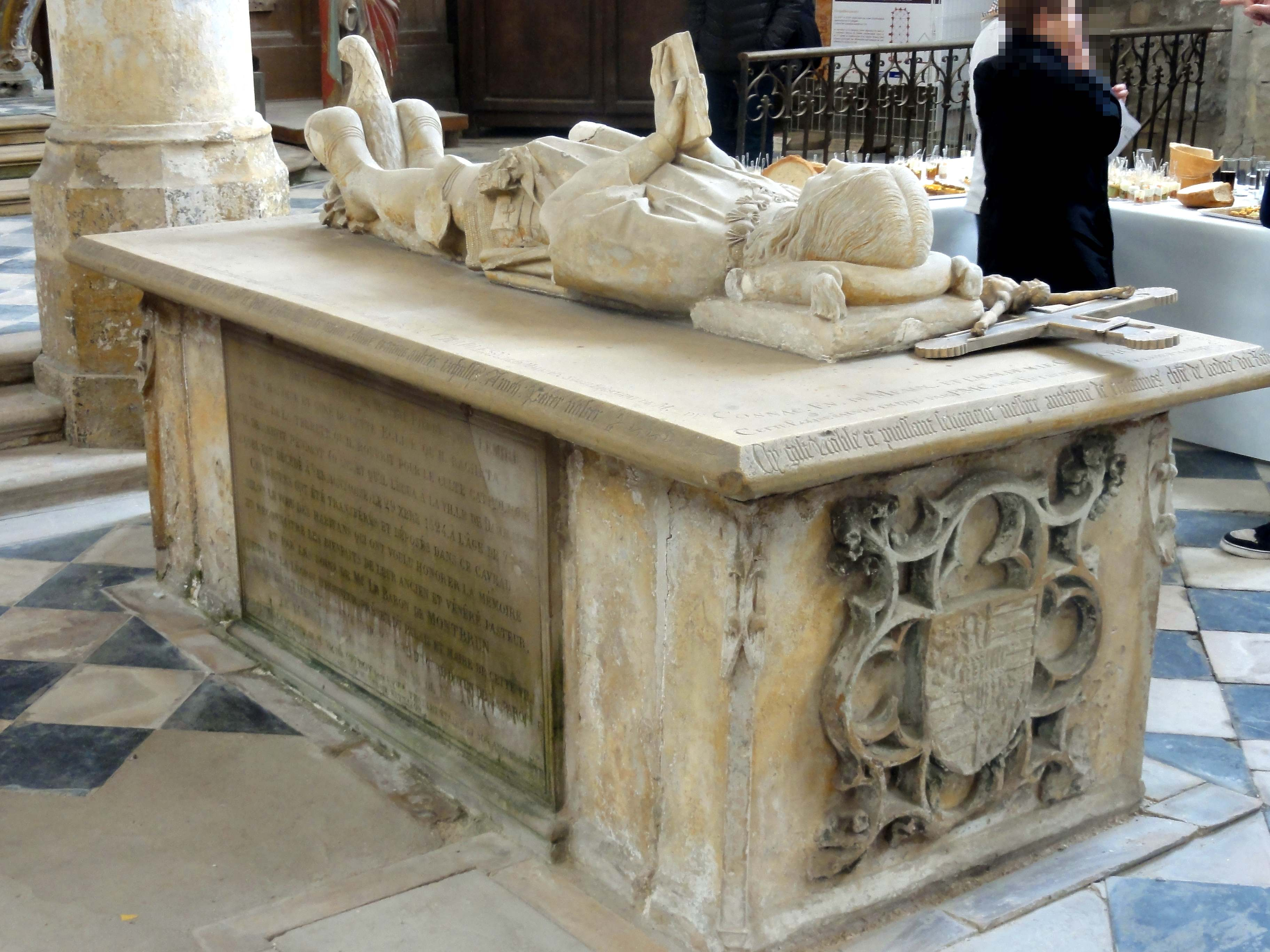 Tombeau d'Antoine de Chabannes, comte de Dammartin, mort en 1488, fondateur de la collégiale.